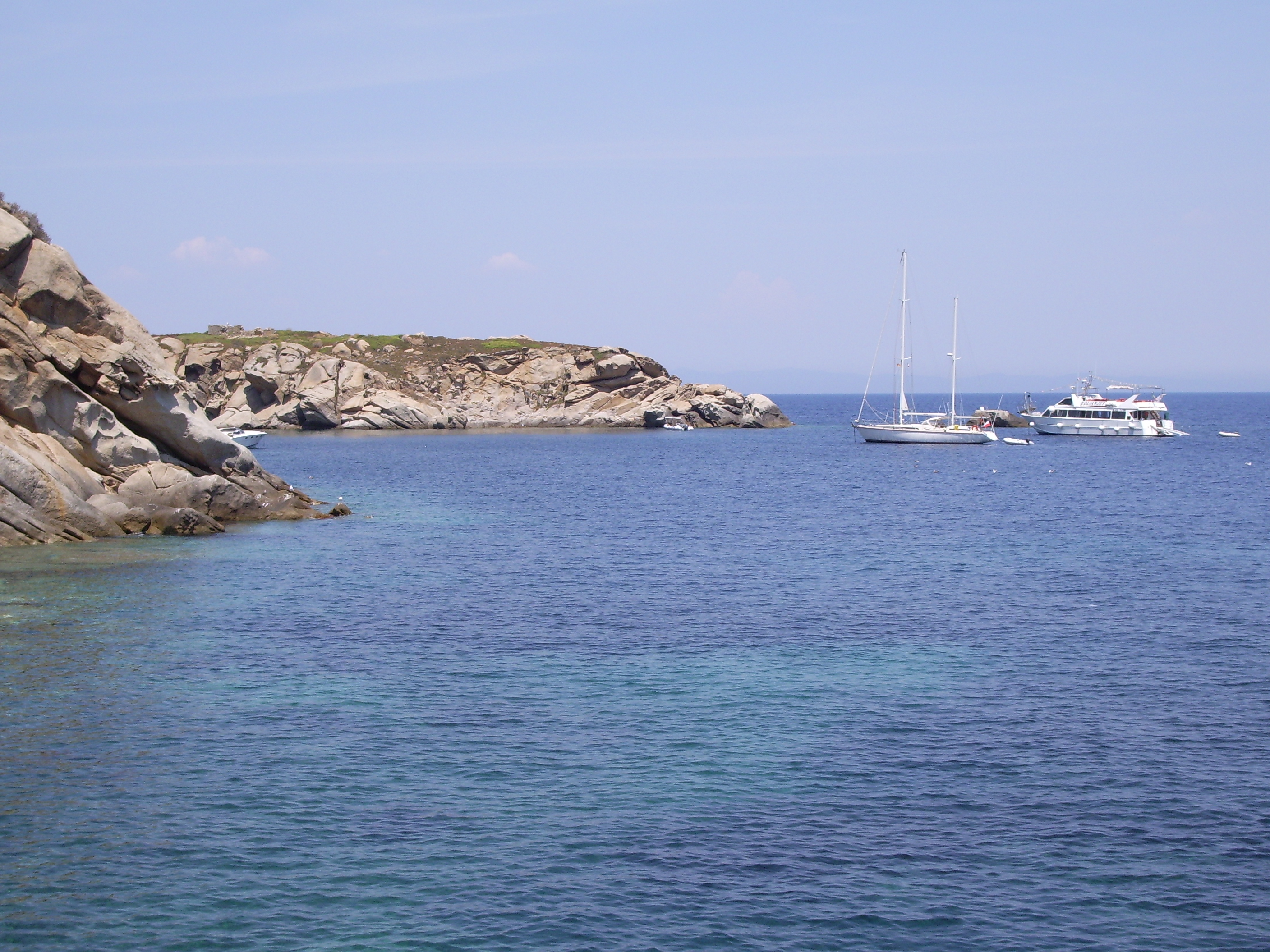 Isola del Giglio, Toscana, Italia